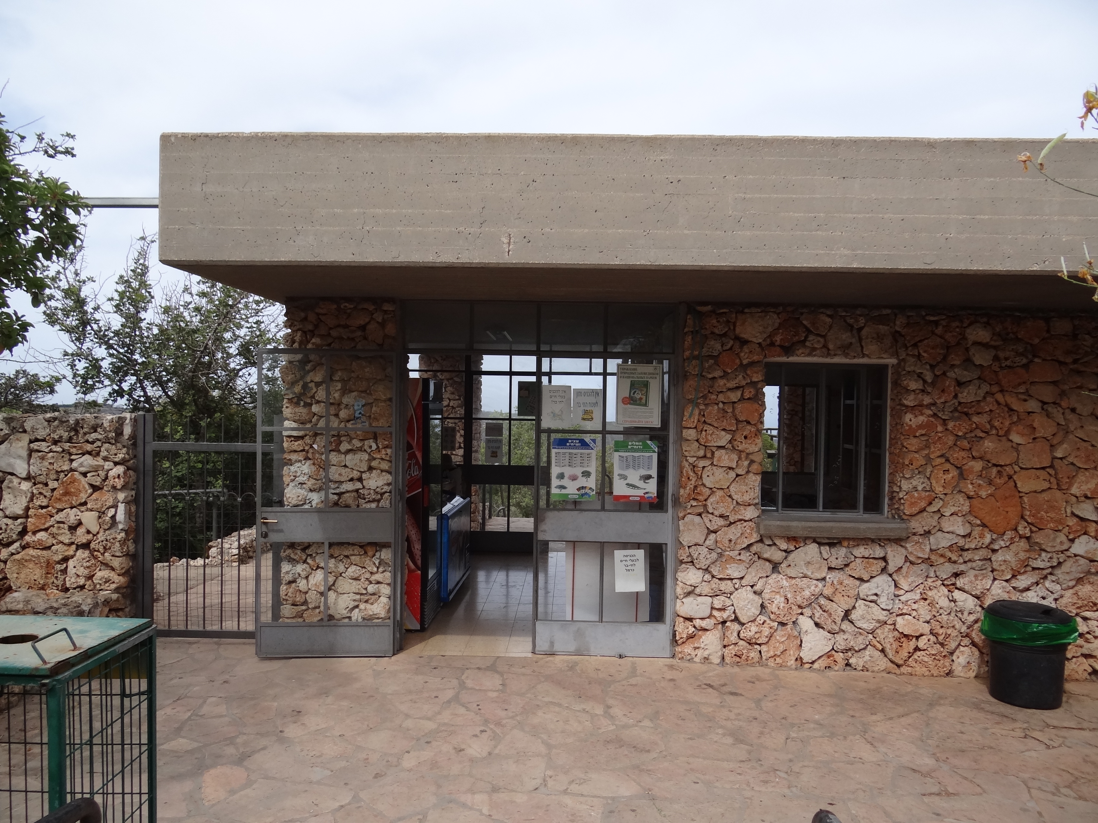 Category:Carmel Hai-Bar Nature Reserve, Animal Nature Reserve. Mount Carmel Israel חי-בר כרמל משמש כמקום רבייה לבעלי חיים שחיו בכרמל ונעלמו. ביניהם, אייל הכרמל, יחמור פרסי, נשר, עיטם זנב לבן, צבי ארצישראלי, עז בר וכבש בר הכניסה לחי בר כרמל